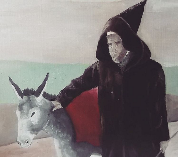 Homme portant un burnous et son âne This is an image of Cultural Fashion or Adornment from Tunisia